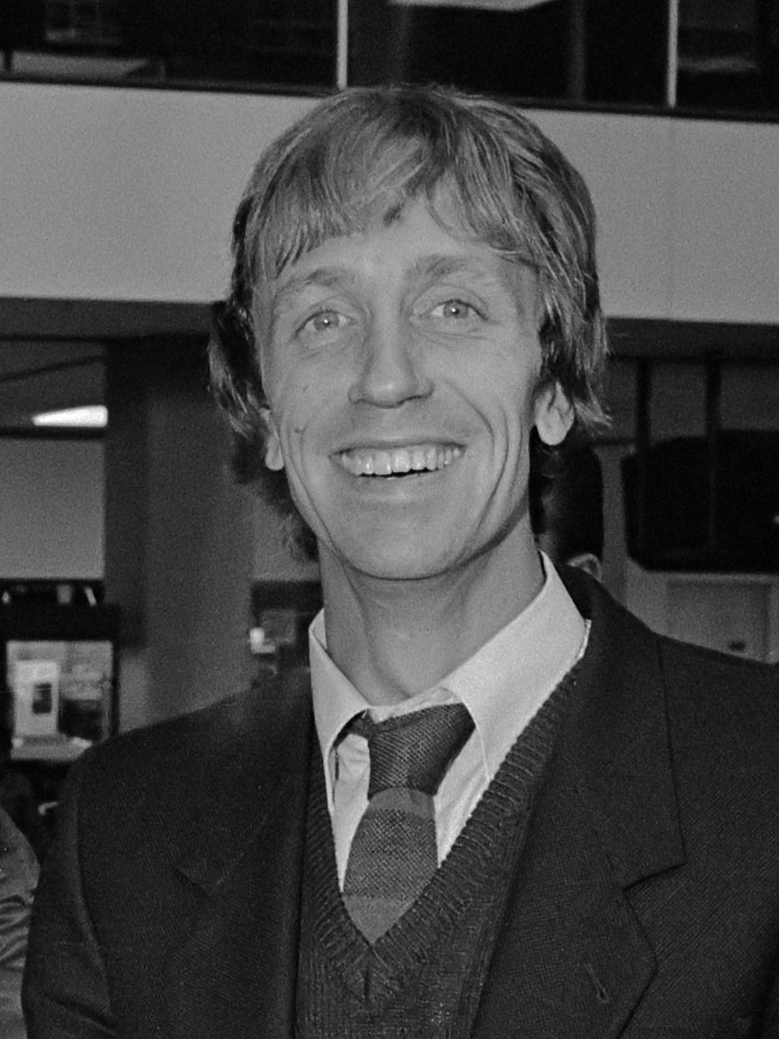 Vertrek van FC Haarlem van Schiphol naar Moskou, voor het UEFA Cup duel tegen Spartak-Moskou. V.l.n.r. trainer Martin Haar, Hans van Doorneveld en Gerrie Kleton 18 oktober 1982